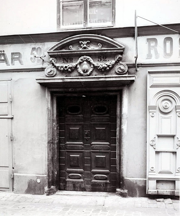 Västerlånggatan 52, portal till "Sidenhuset Päron"